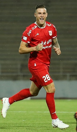 هفته دوم لیگ برتر فوتبال ایران ۱۳۹۷-۹۸